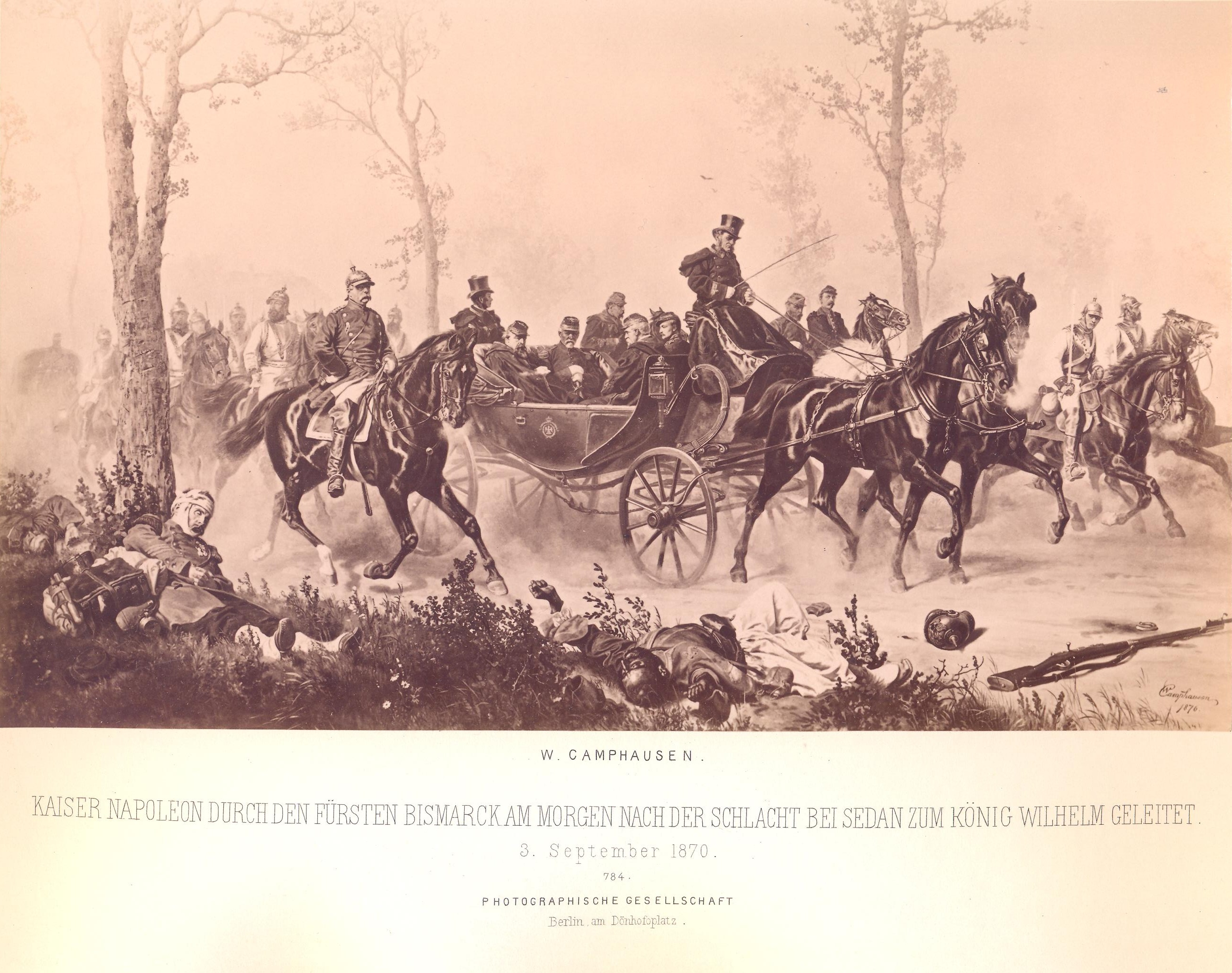 Ото фон Бисмарк, Албум със снимки на Бисмарк, издаден по случай 80-годишнината му в Берлин, 1895 г.